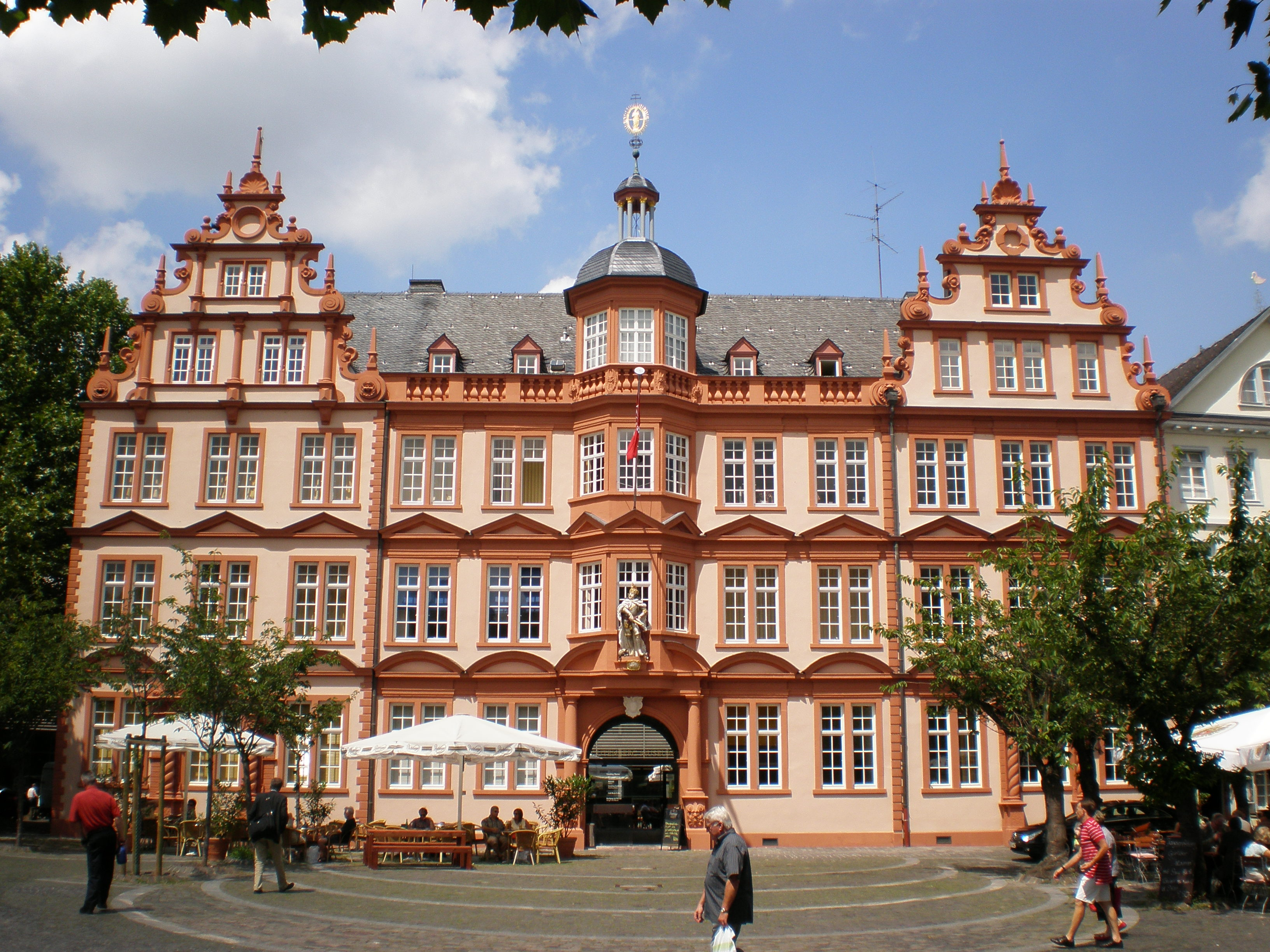 Zum Römischen Kaiser in Mainz, ehem. Gutenberg-Museum